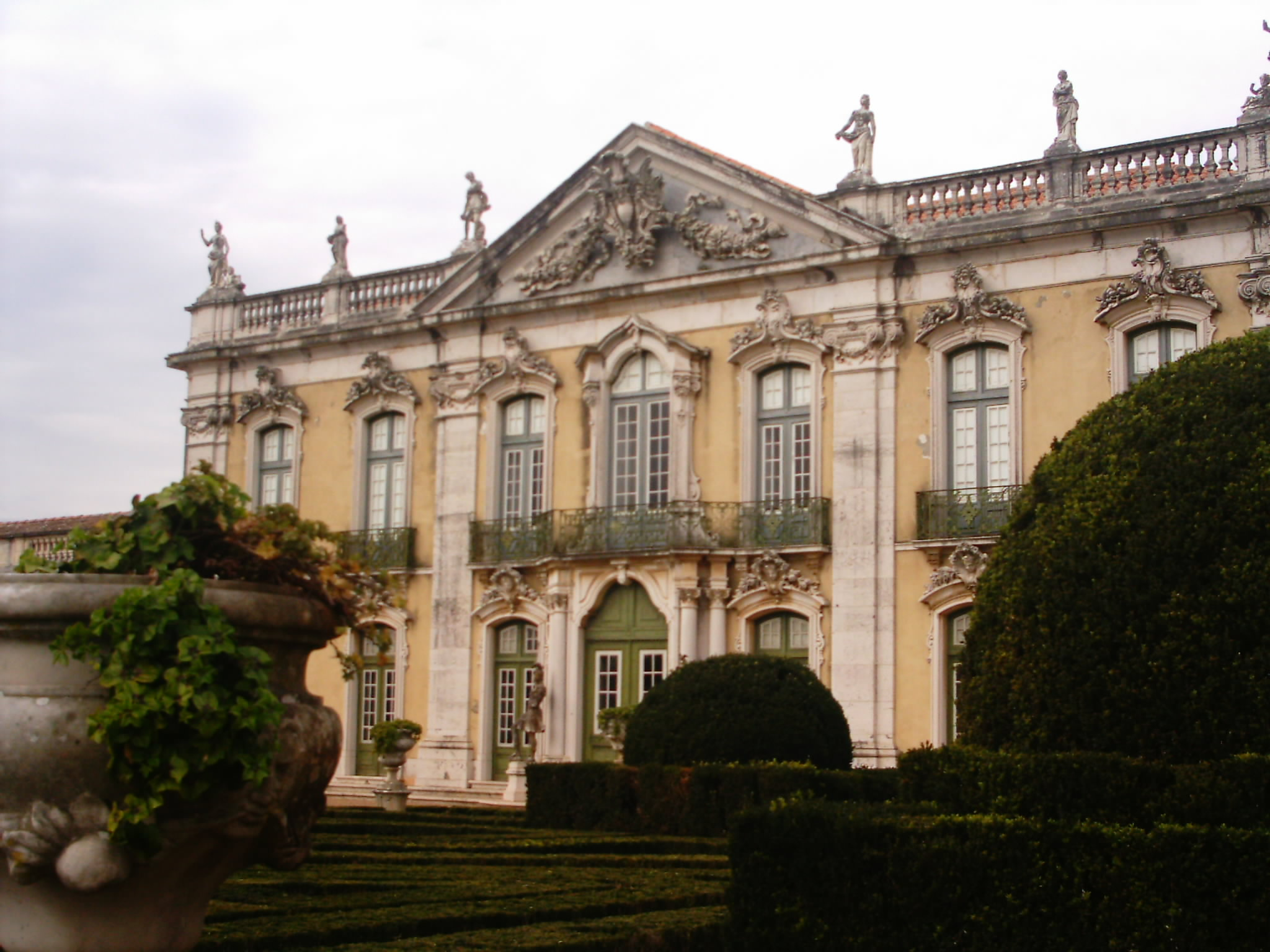 Palácio de Queluz, Portugal. Vista dos jardins do palácio para as fachadas.